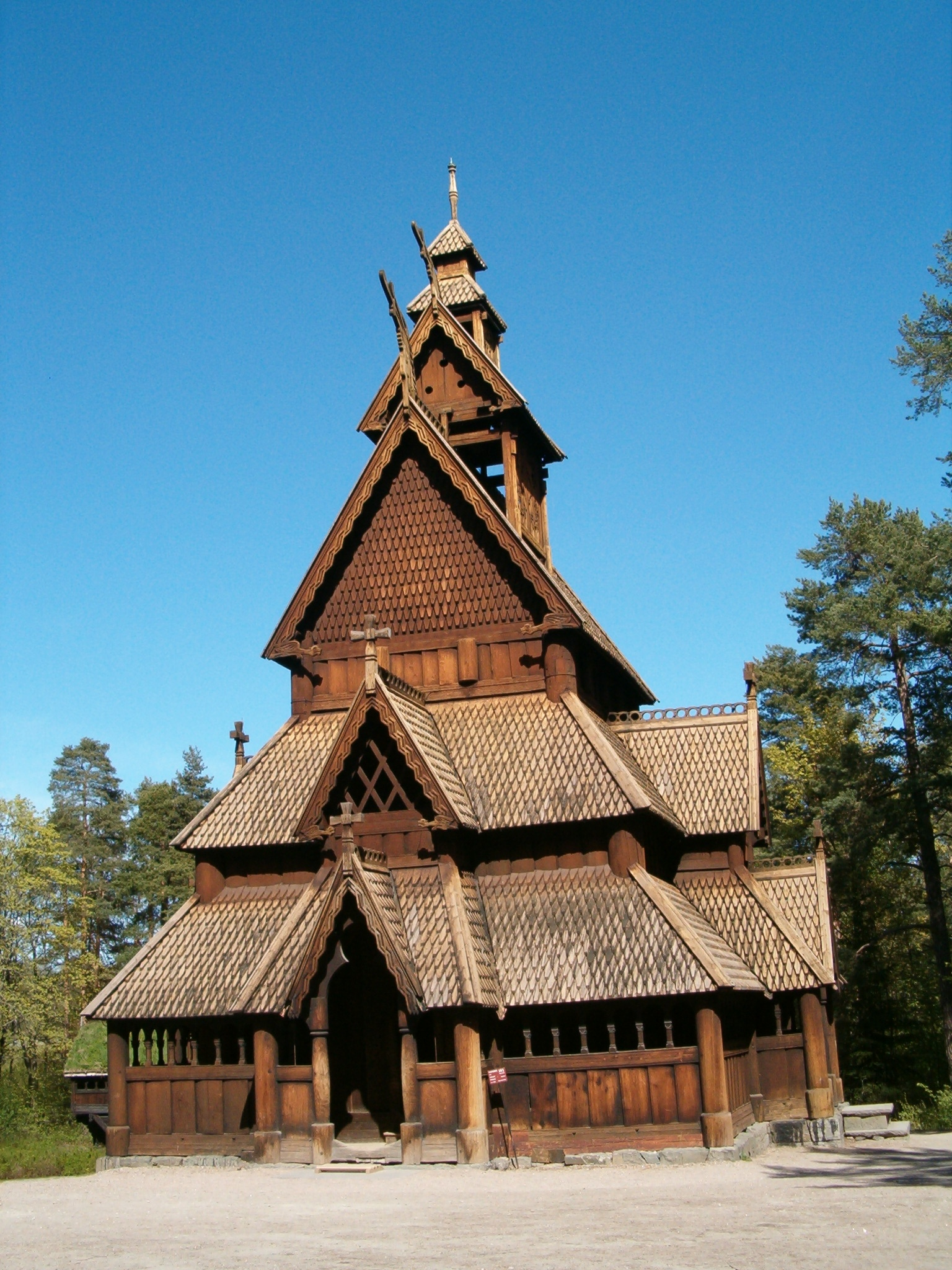 Stavkirke w Norwegii. Autorem zdjęcia jest Lestat.